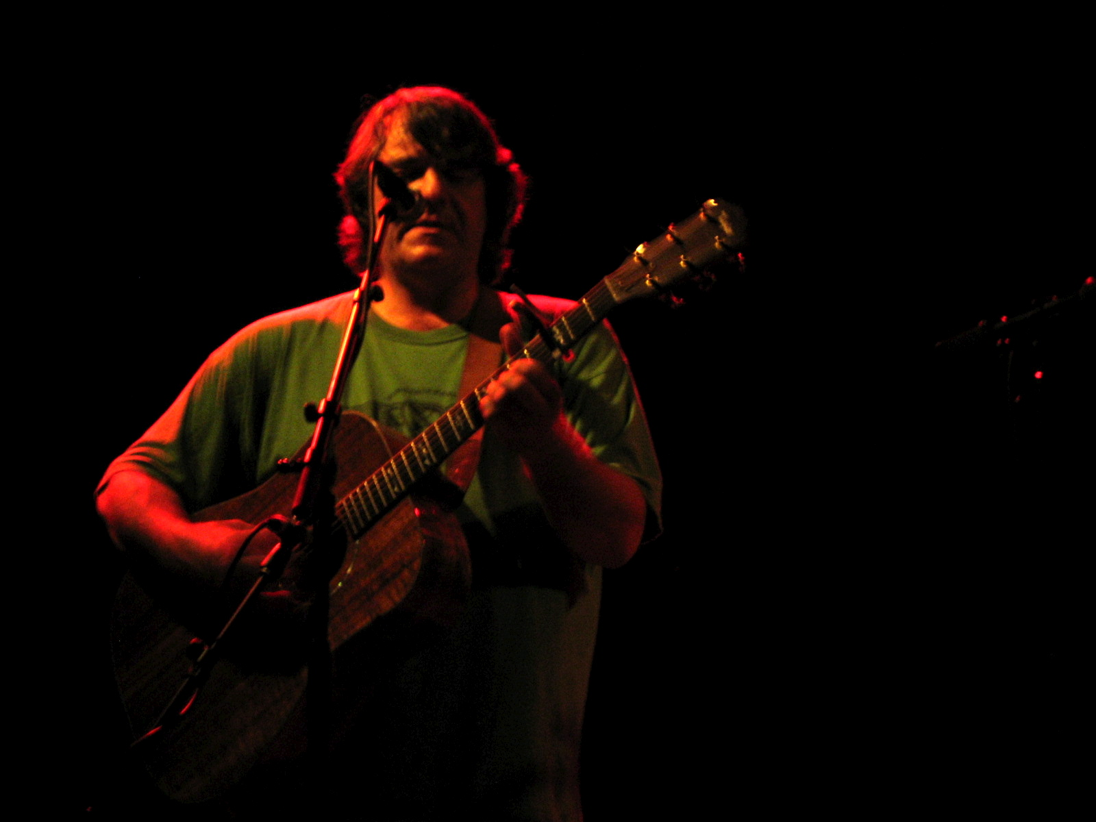 Darrell Scott @ Paradiso (Amsterdam, The Netherlands)